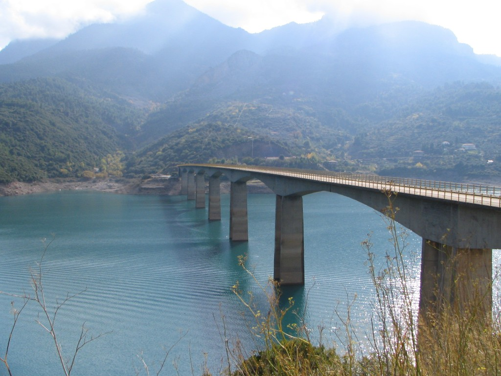 Bridge of Episkopi vilage - Kremasta lake